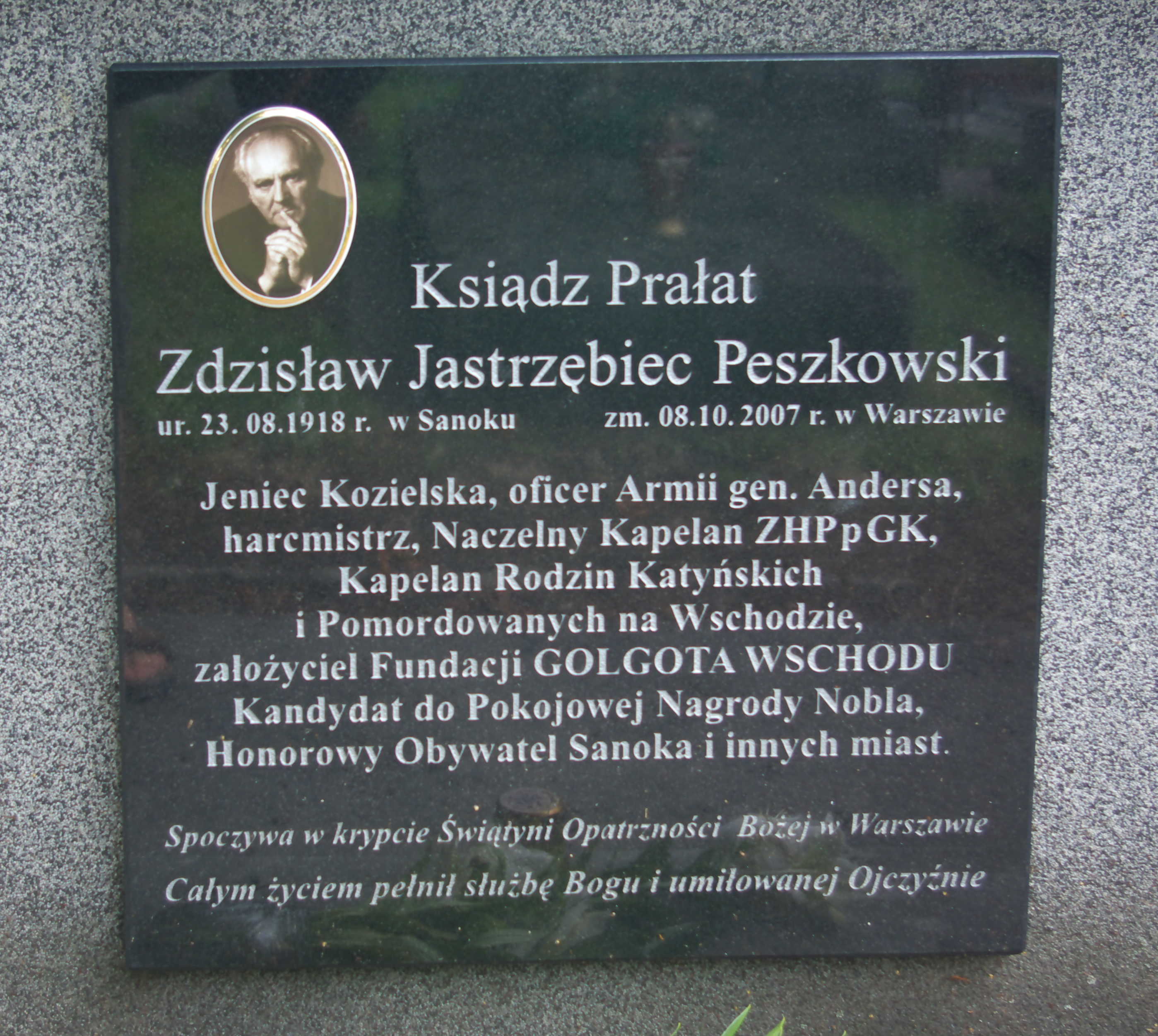 Tablica symboliczna ks. Zdzisława Peszkowskiego na Cmentarzu Centralnym w Sanoku